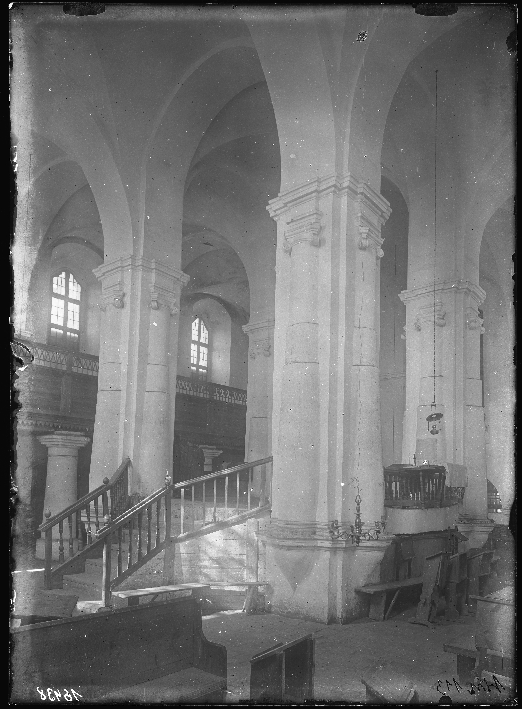 Беларуская (тарашкевіца): Друя (Druja). Сынагога